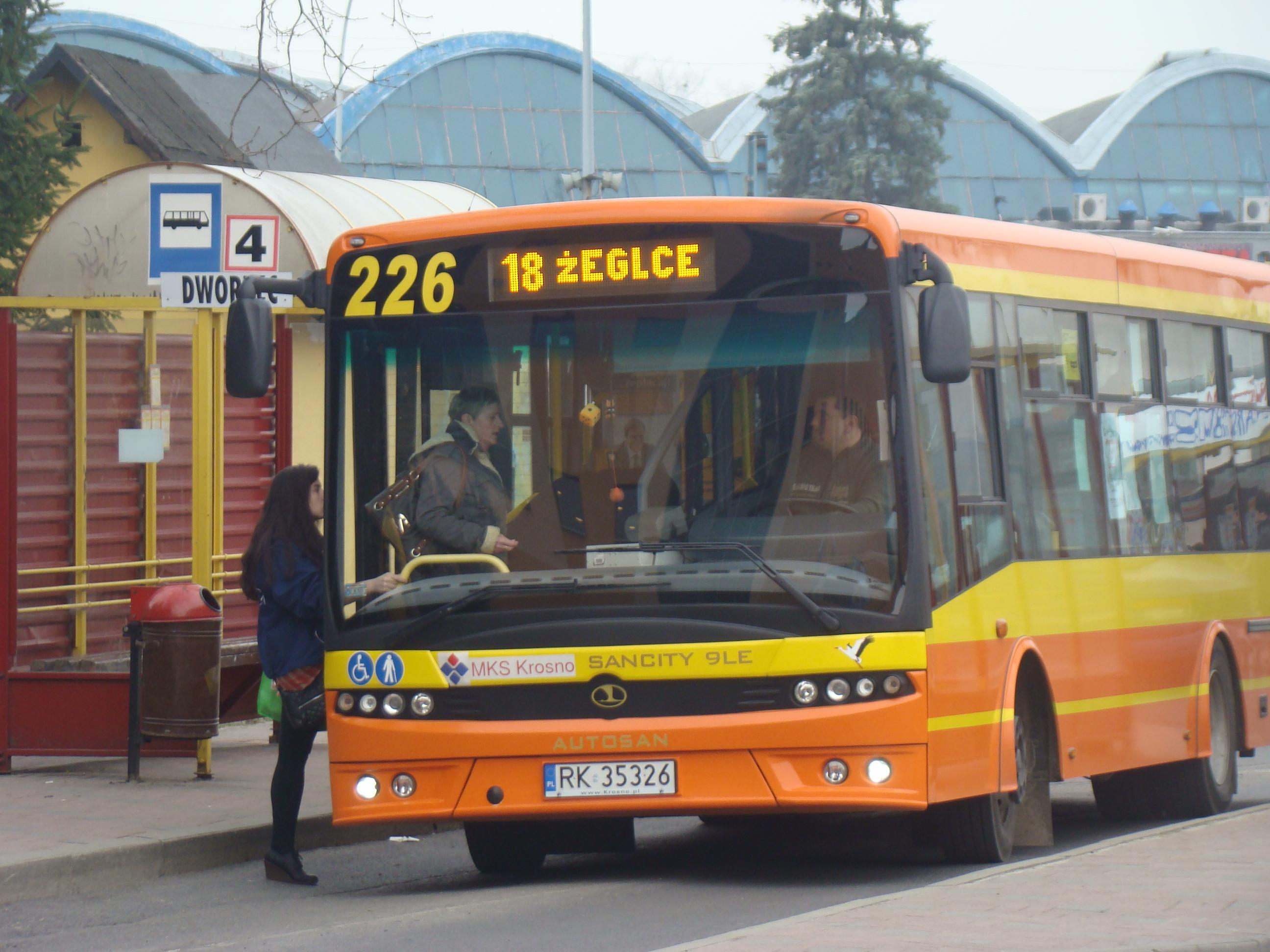 Autosan M09LE Sancity - MKS Krosno